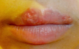 免疫系統低落時就會復發!!!